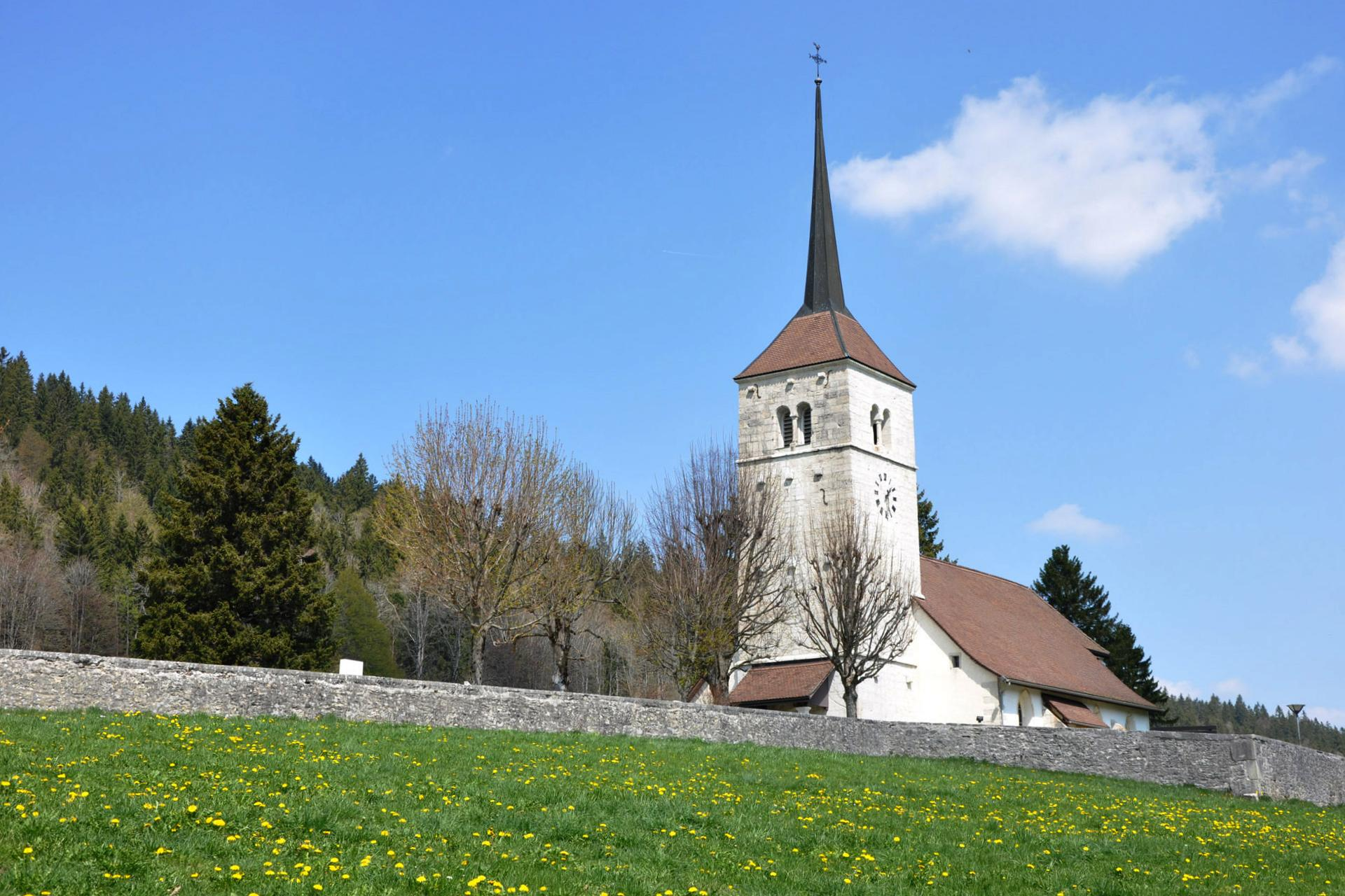 Reformierte Kirche des Dorfes La Sagne im Vallée de la Sagne (auch als Vallée des Ponts bezeichnet) des Neuenburger Juras.